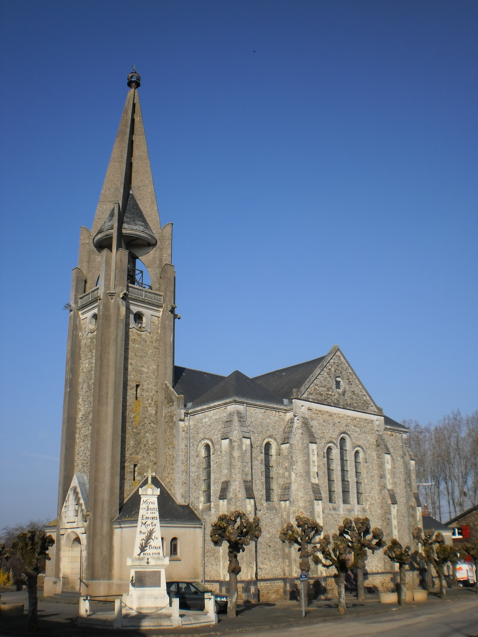 église de Noyal-sur-Brutz (Loire-Atlantique, France).